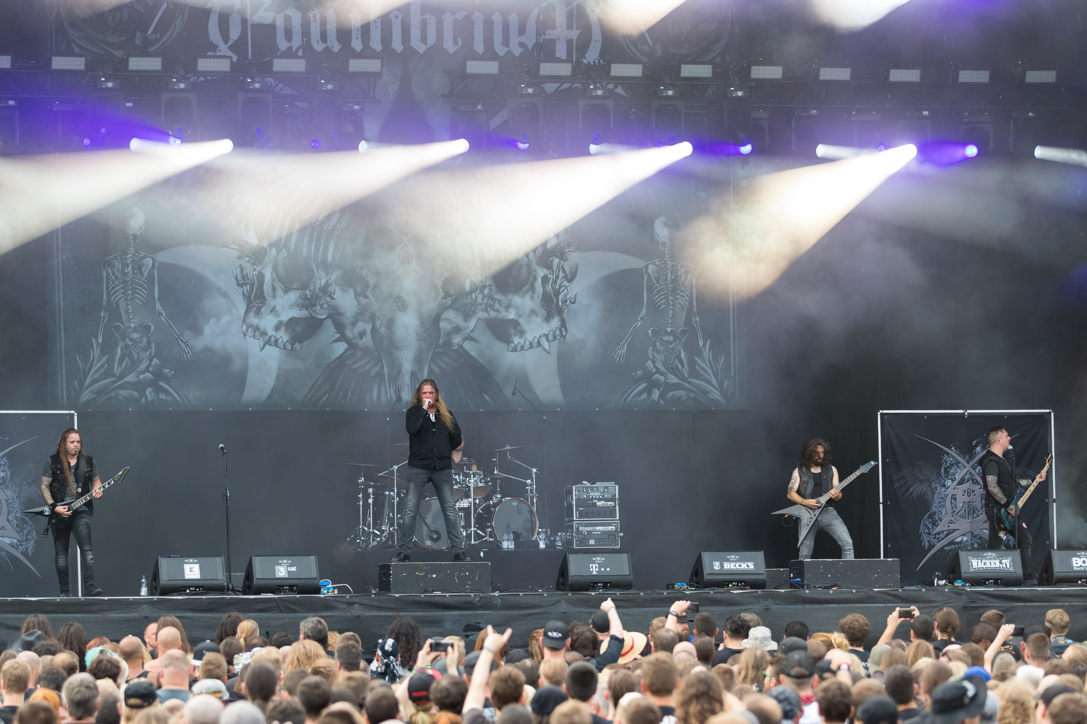 Equilibrium during Wacken Open Air at The Holy Wacken Land, Wacken, Schleswig-Holstein, Germany on 2019-08-02, Photo: Sven Mandel